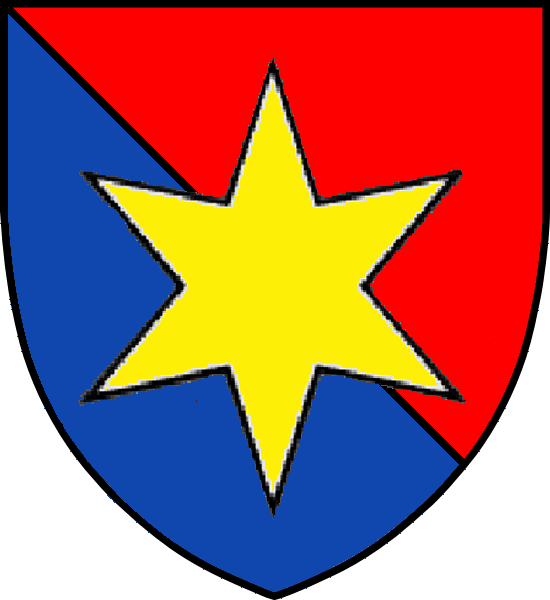 Påstått vapen för den ifrågasatta svenska frälseätten Lindsbroätten